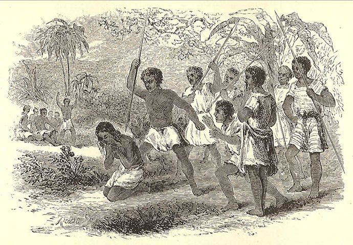 Dood van Rasalama, illustratie uit A narrative of the persecution of the Christians in Madagascar; with details of the escape of the six christian refugees now in England door Joseph-John and David Freeman (Johns), David Johns